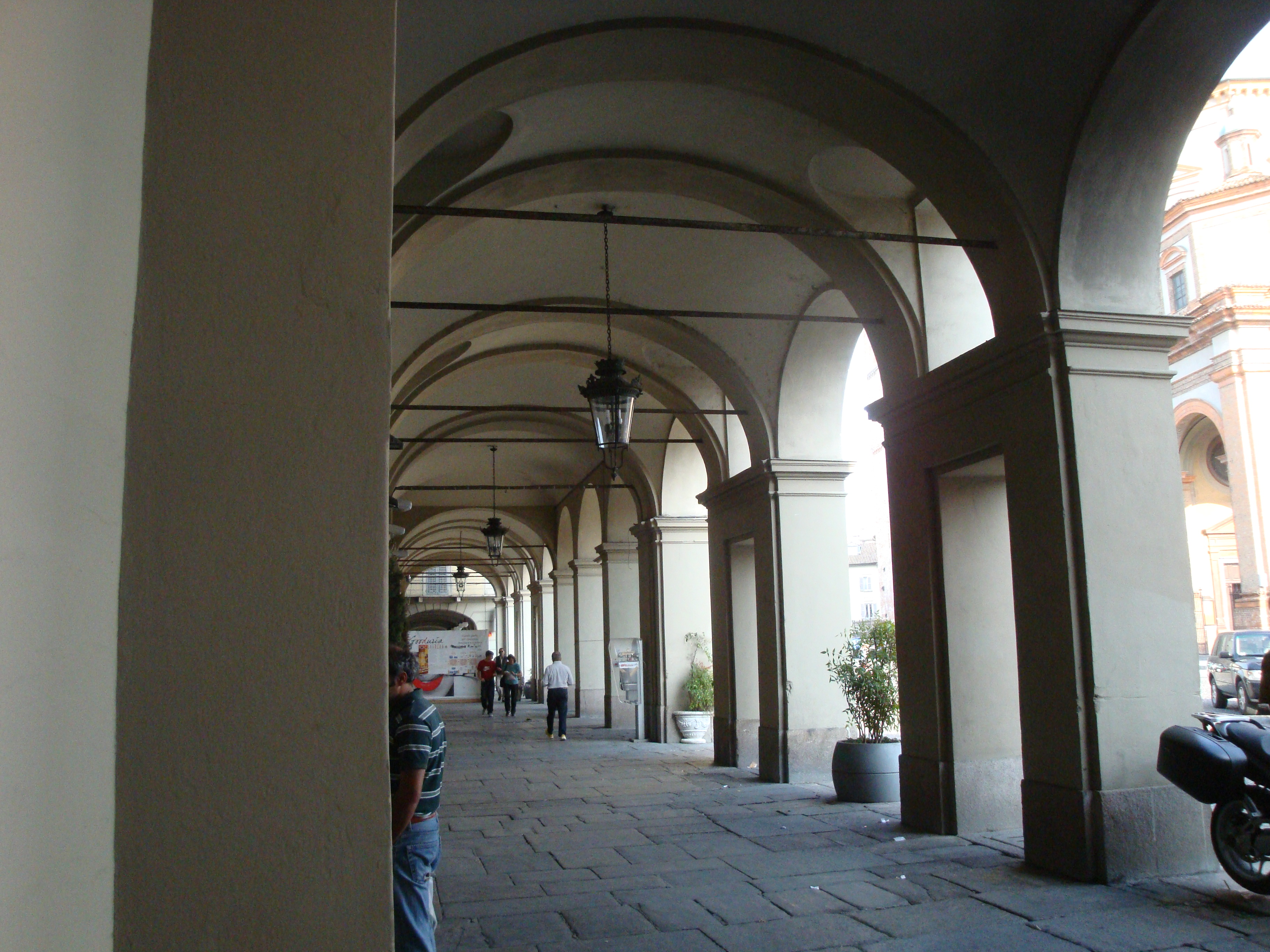 Voghera